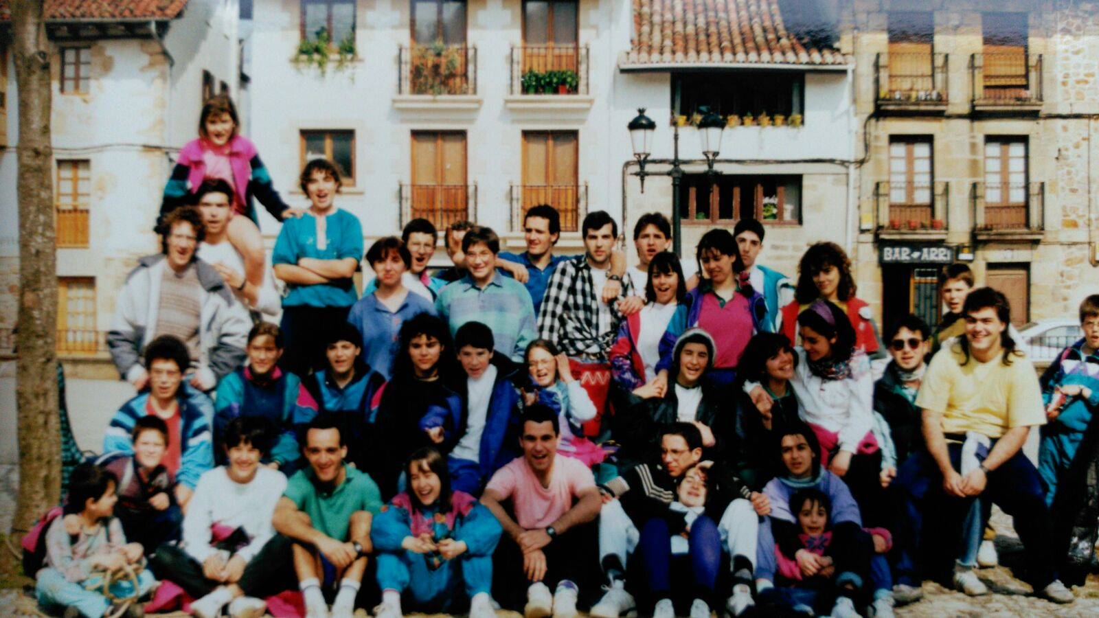 Begirale eta umeak